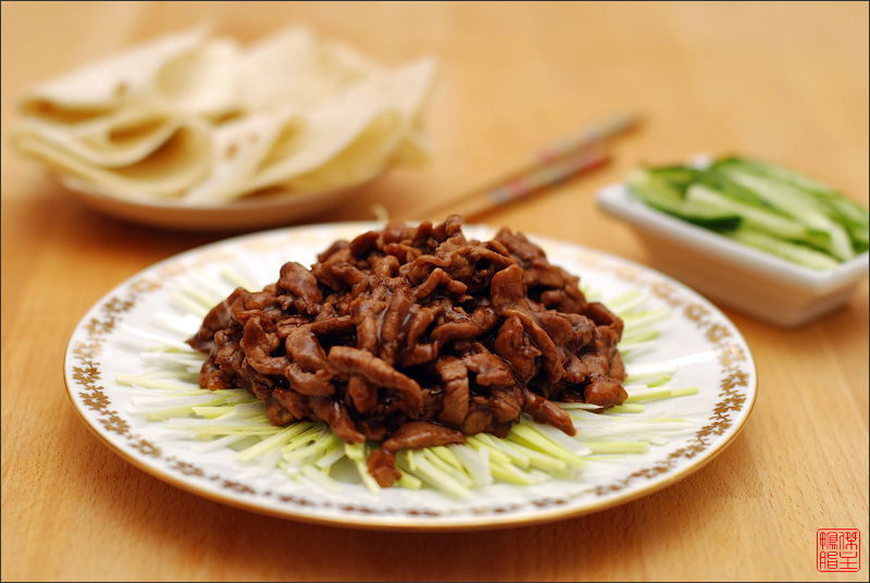 китайское блюдо